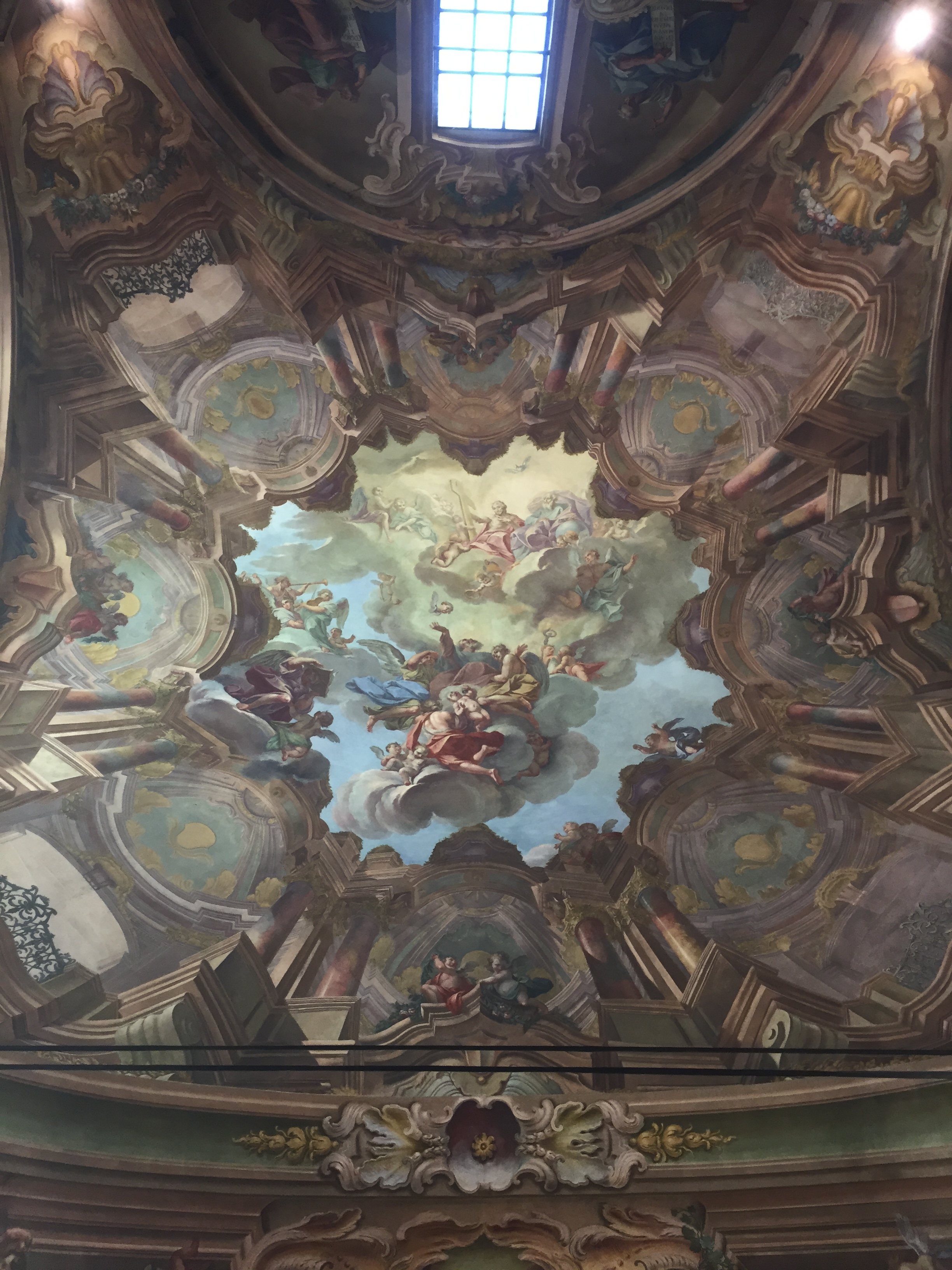 Interno chiesa di S. Antonio alla Motta, Varese, Italia